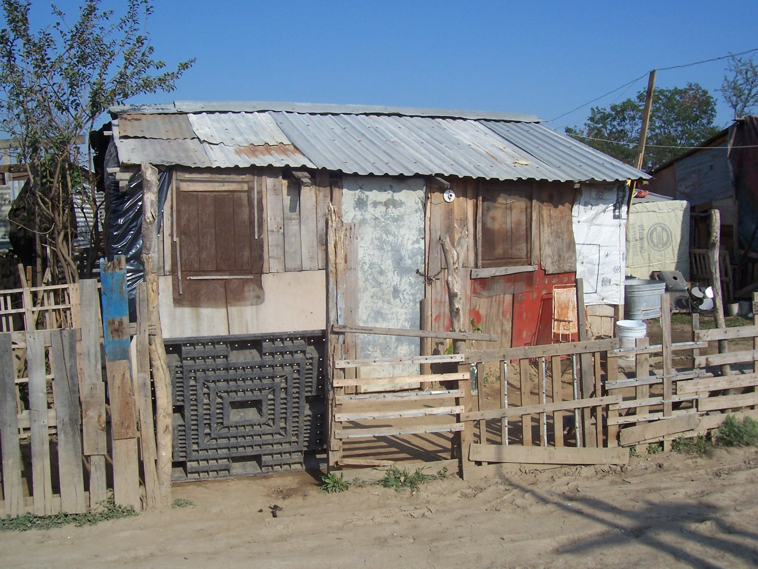 Asentamiento en México Asentamiento marginado "Colinas del Río", en el municipio Benito Juárez del Estado de Nuevo León en México. Diciembre de 2005. Fotografía tomada por usuario LeCire Marginalized settlement "Colinas del Río", in the municipality Benito Juárez of the State of Nuevo León in Mexico. December of 2005. Photography taken by user LeCire